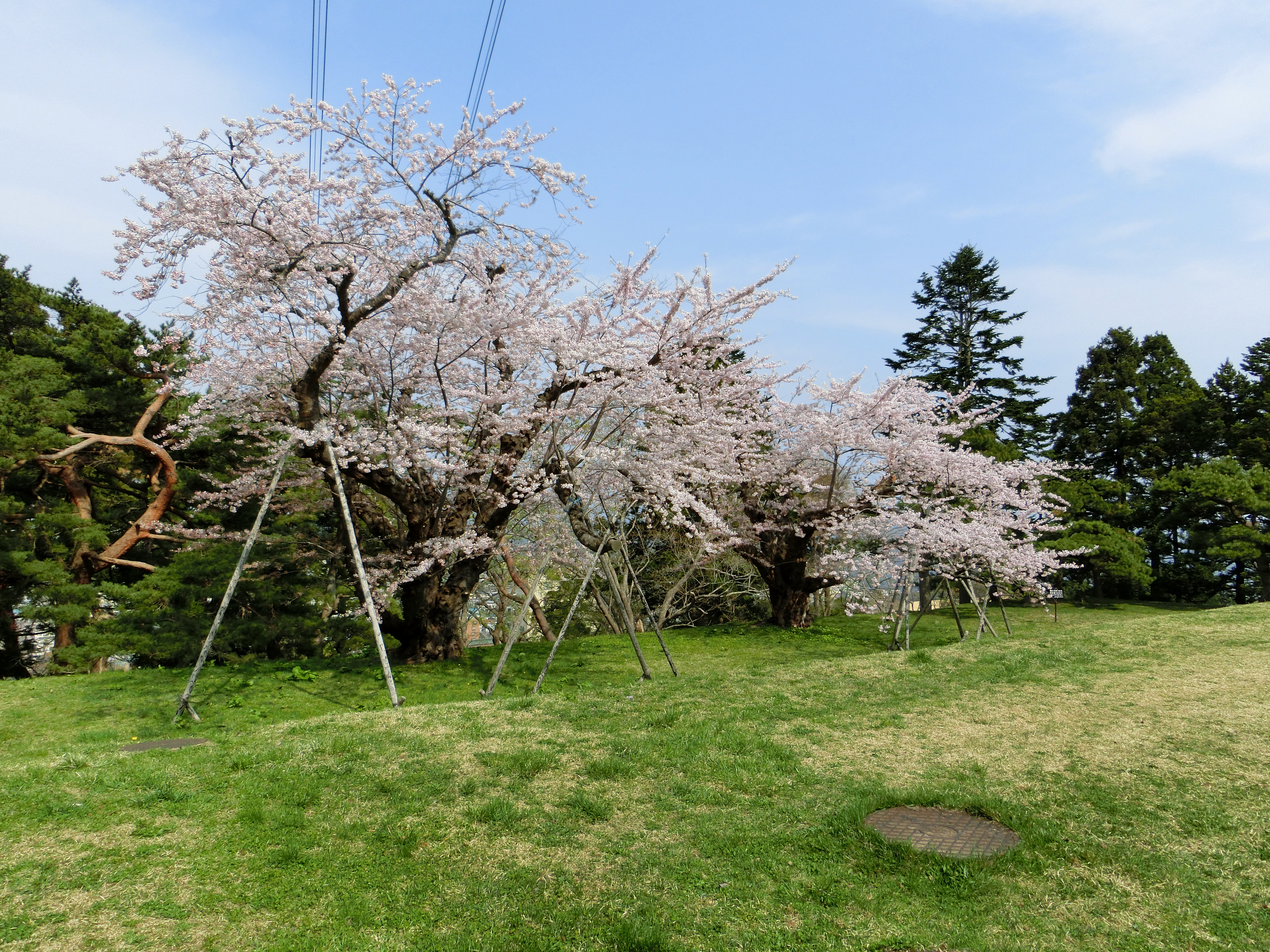 元町配水場にある樹齢100年超のソメイヨシノ